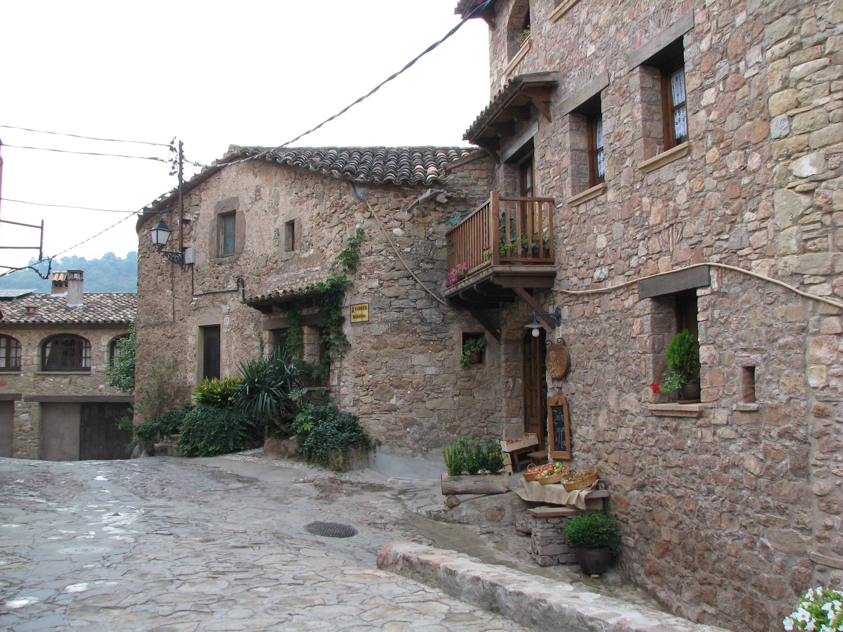 Carrers de Mura, al Bages, Catalunya